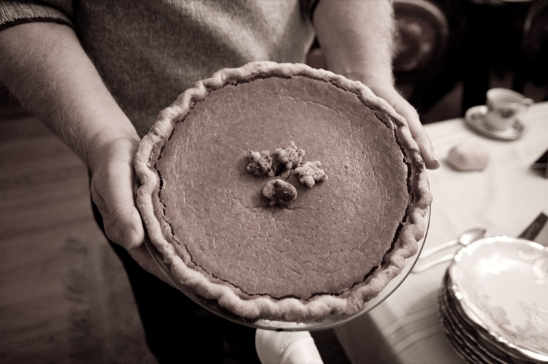 Thanksgiving 2008